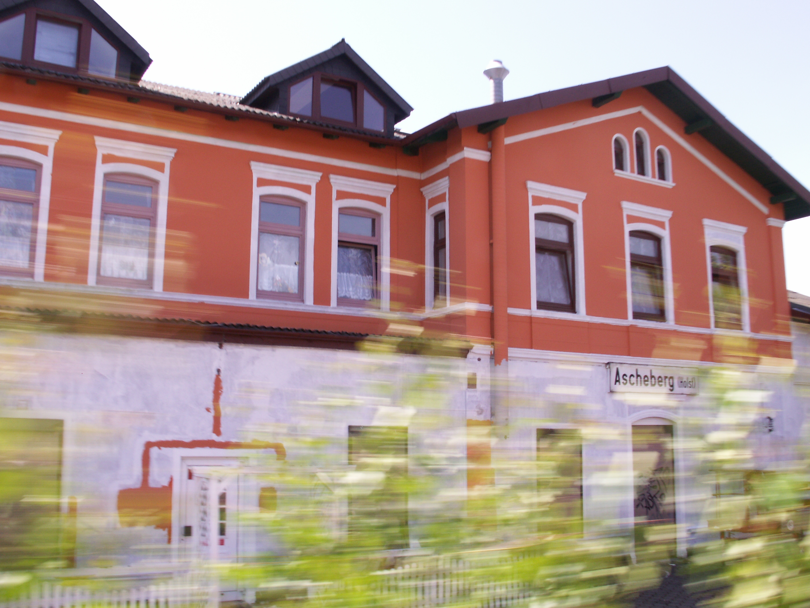 Deutsche Bahn 2007